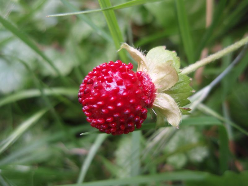 Nommé ainsi en hommage à Antoine Nicolas Duchesnes, auteur d'un ouvrage de référence sur l'histoire naturelle des fraises... la suite sur